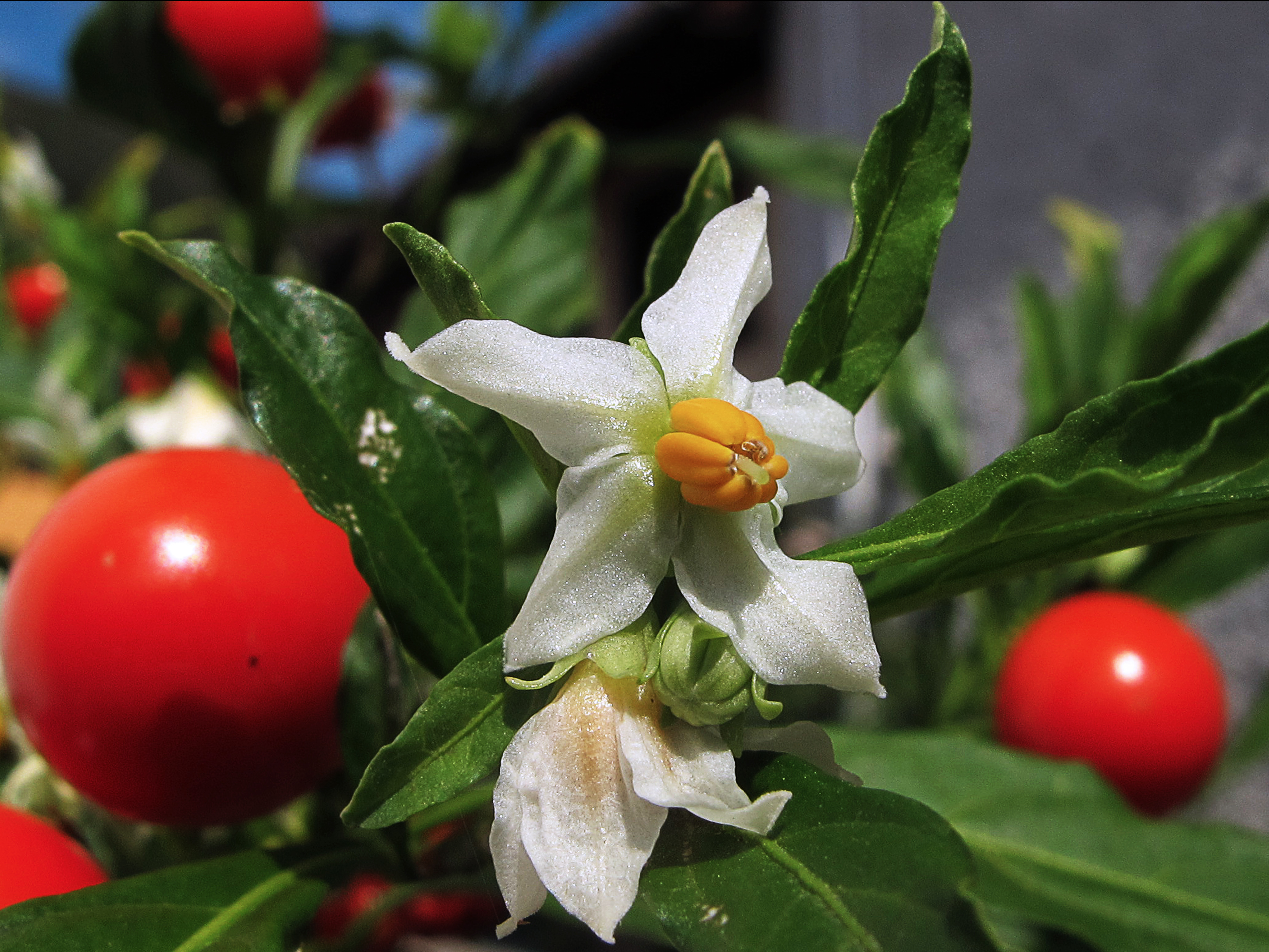 Flores